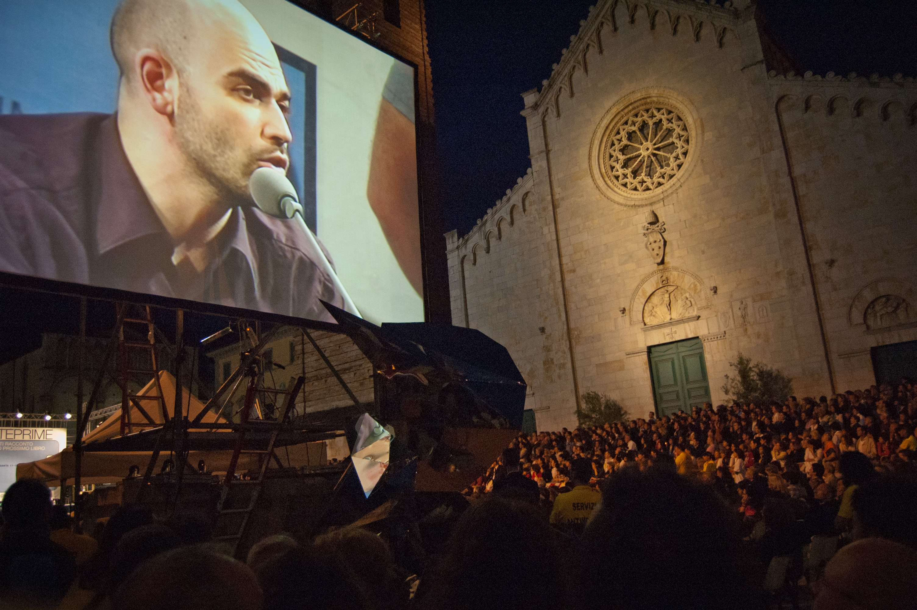 Roberto Saviano